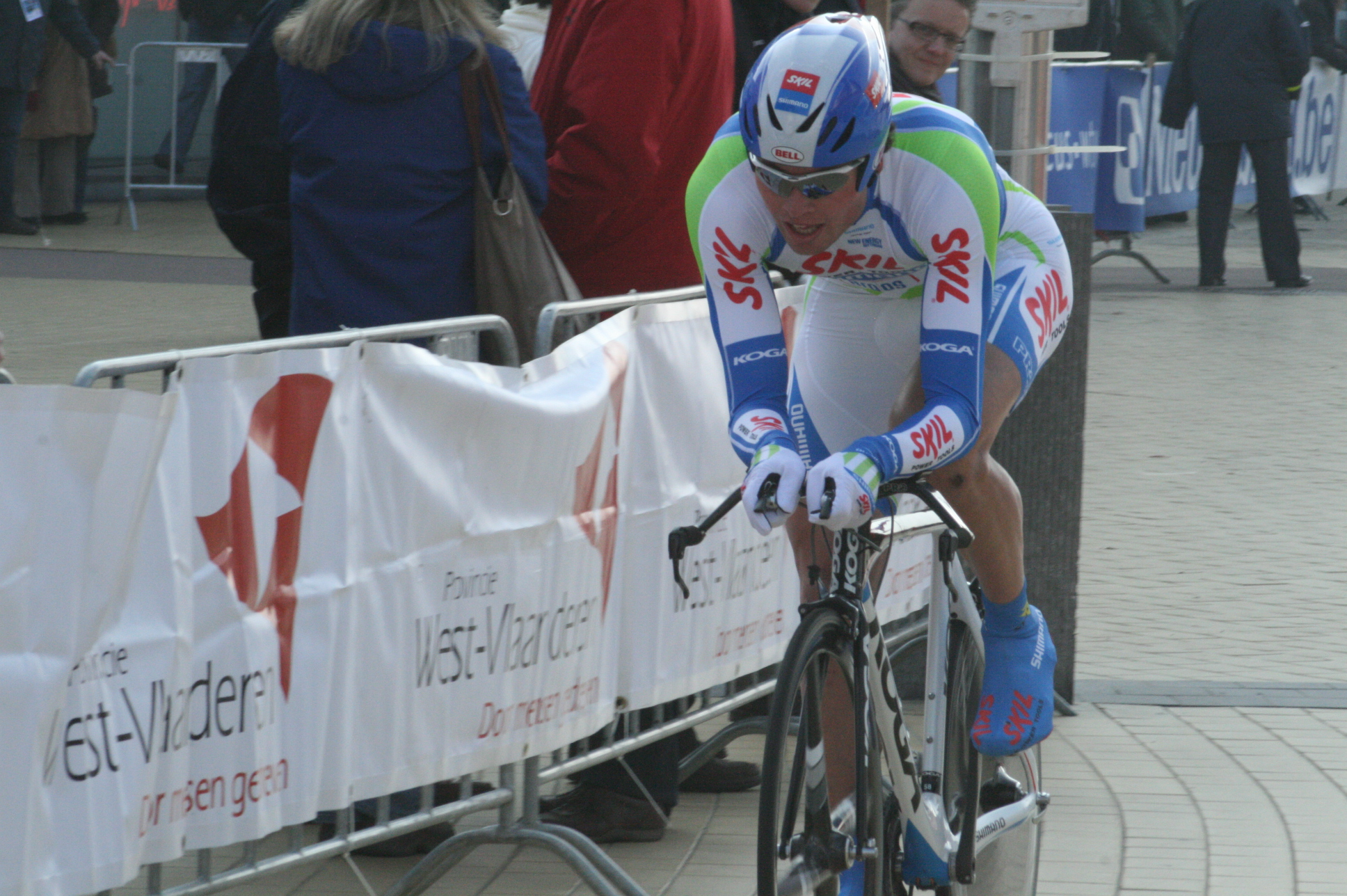 Driedaagse van West-Vlaanderen 2011, proloog in Middelkerke